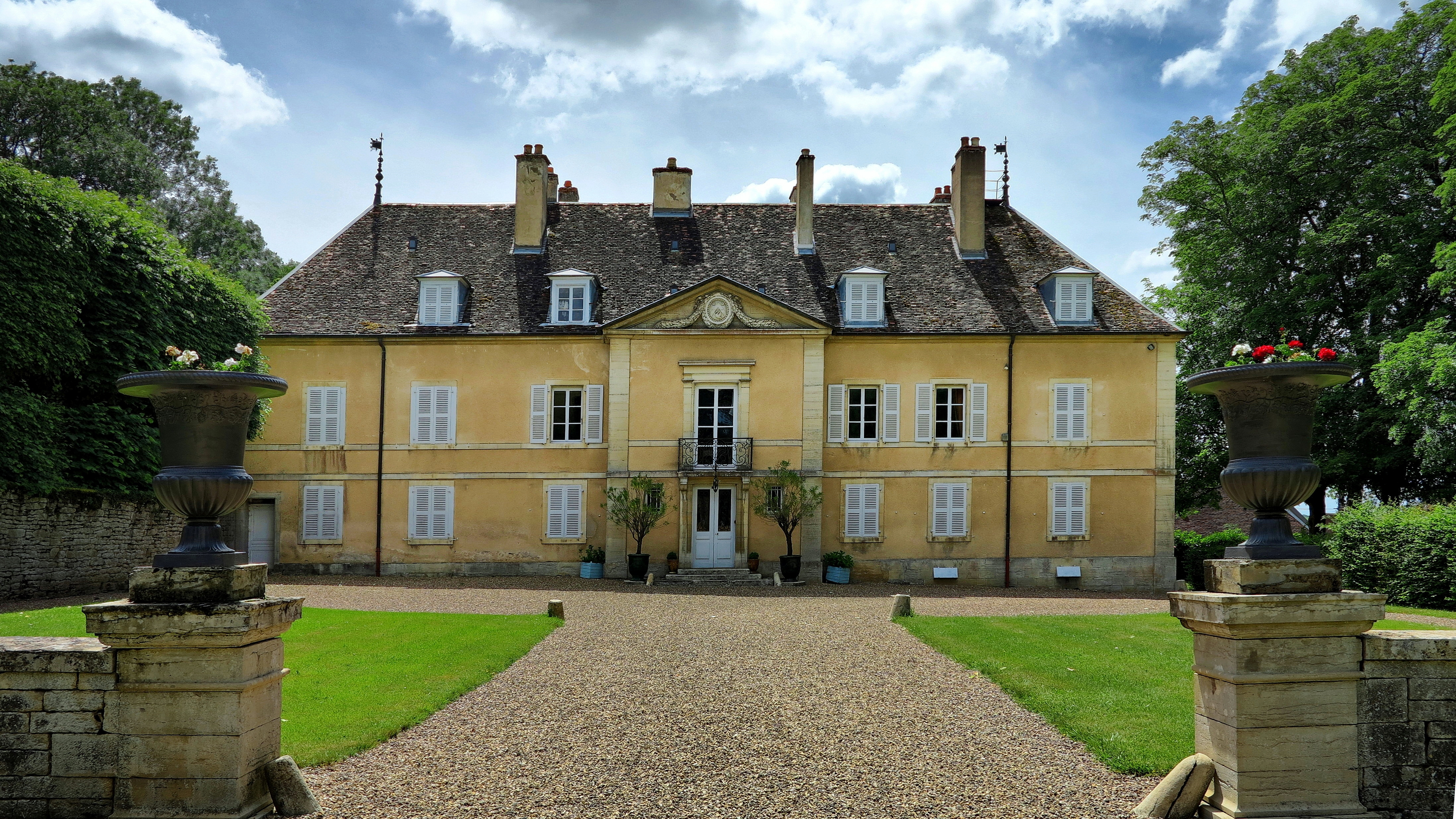 Inscrit aux monuments historiques sous le numéro PA00101656